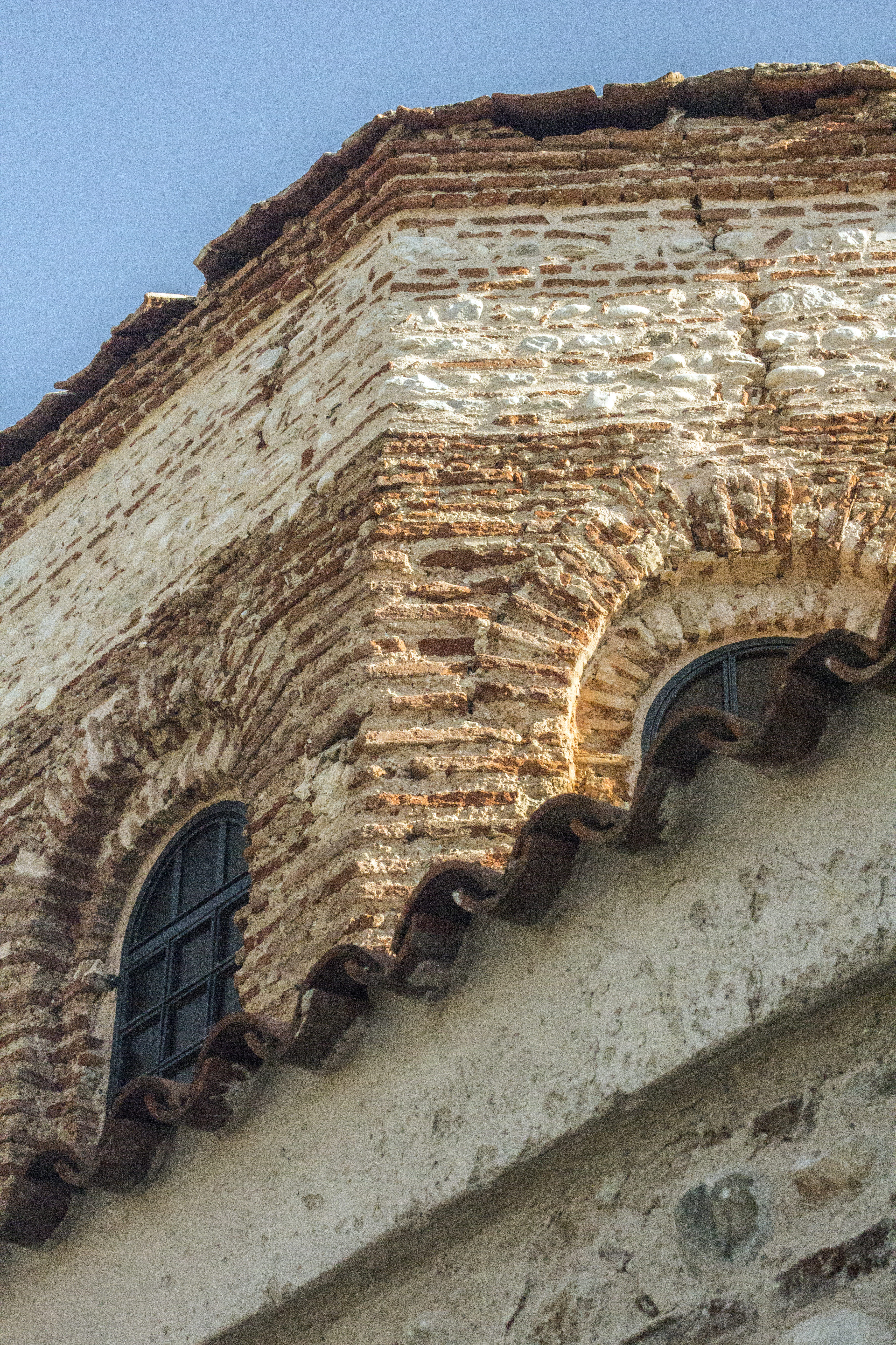 Ναός Αγίας Σοφίας Δράμας«Ναός Αγίας Σοφίας Δράμας»